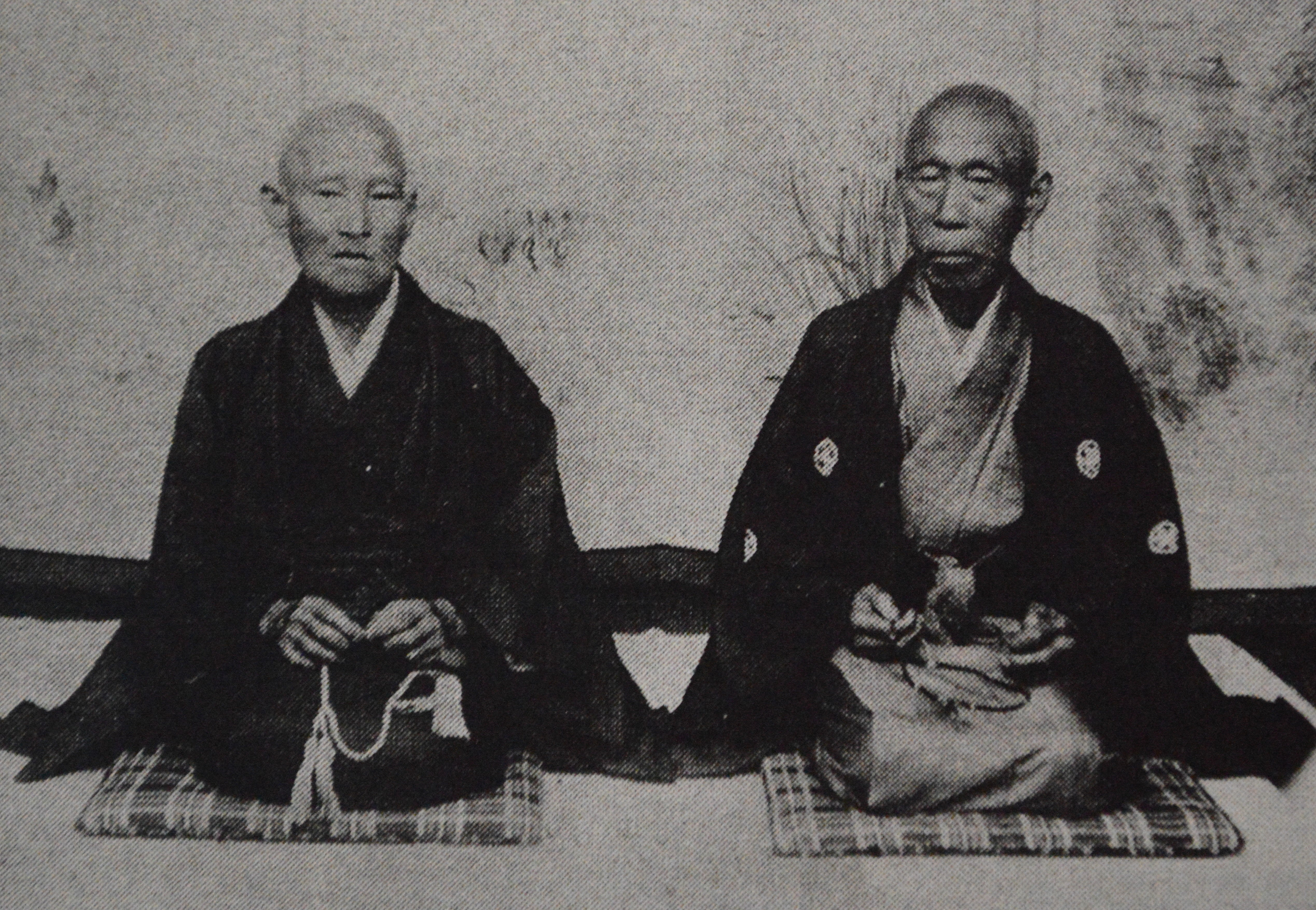 片岡春吉の実父である三輪定右衛門（右）と実母である三輪ゆり（左）。